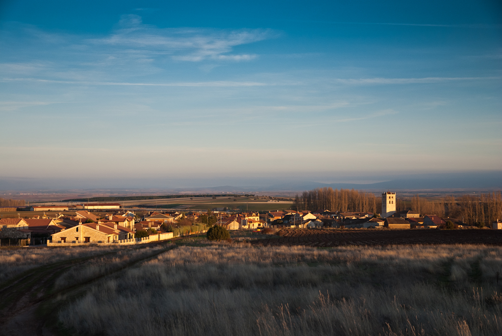 Lástima de viñeteado. CámaraNikon D60 Exposición0,003 sec (1/320) Aperturef/5.6 Lente42 mm Velocidad ISO200 Tendencia de exposición0 EV FlashNo Flash